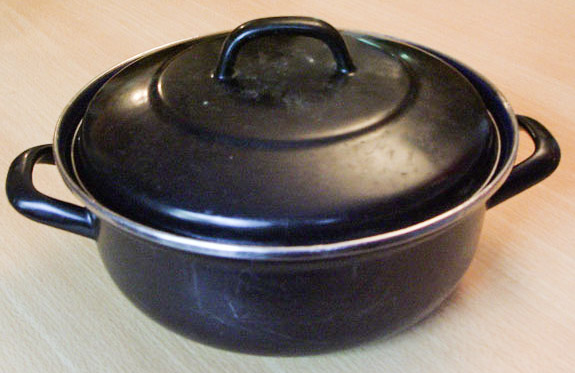 een braadpan (ook wel sudderpan genoemd). Zelf gemaakt, PD.